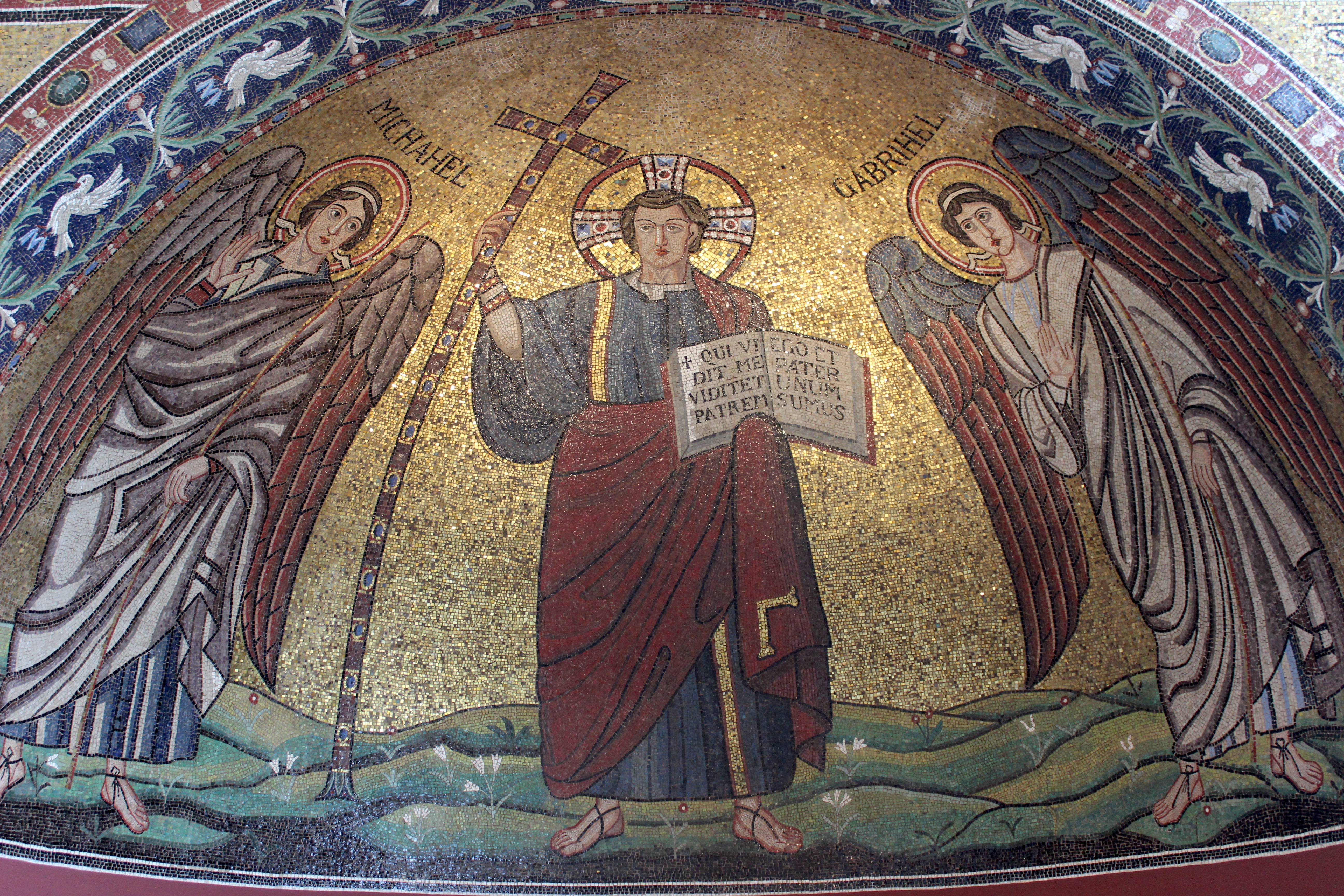 Berlín, Bode Museum. Mosaico de San Michele in Africisco procedente de Ravenna.